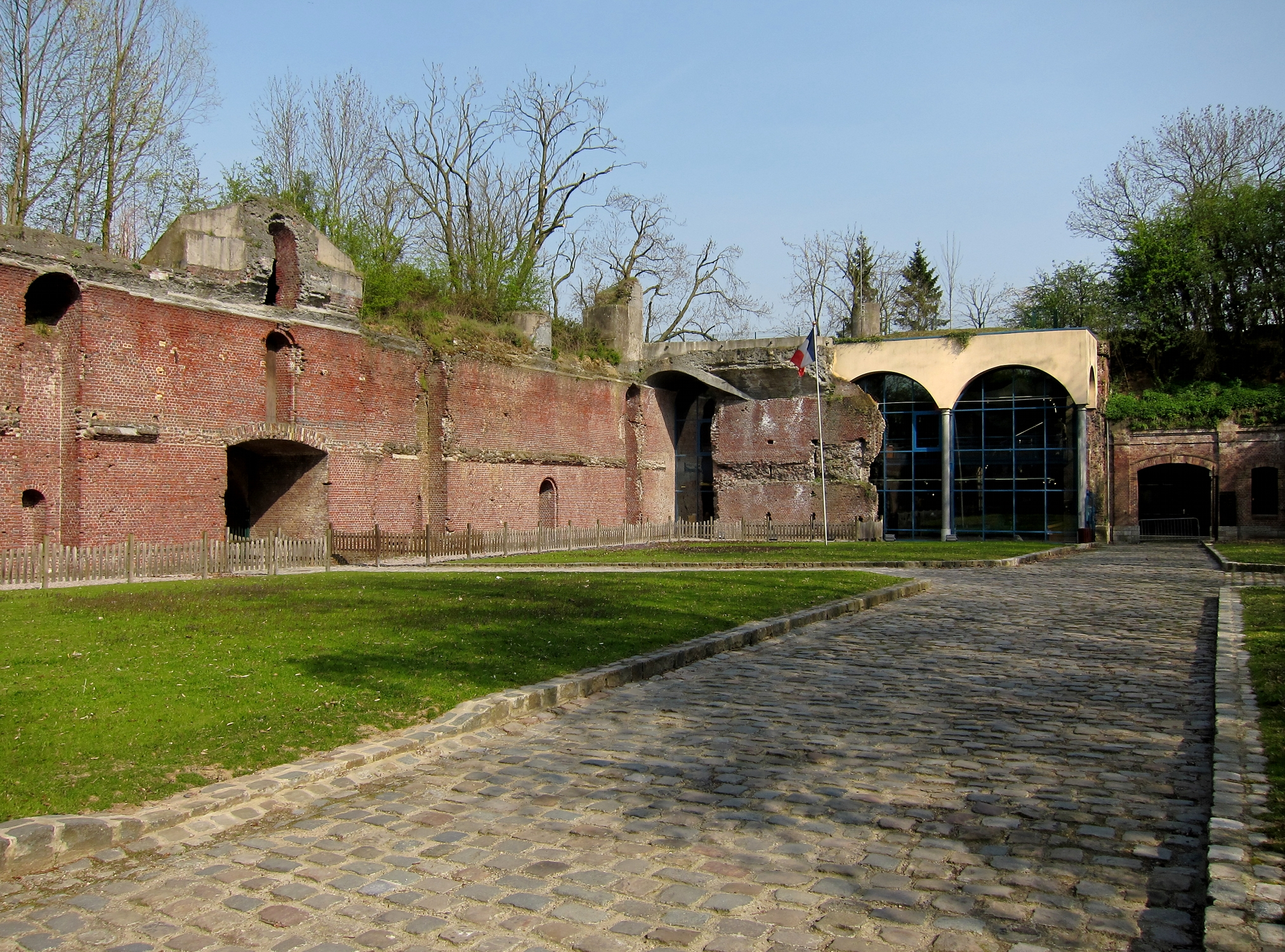 Le musée de la Résistance à Bondues (Nord).